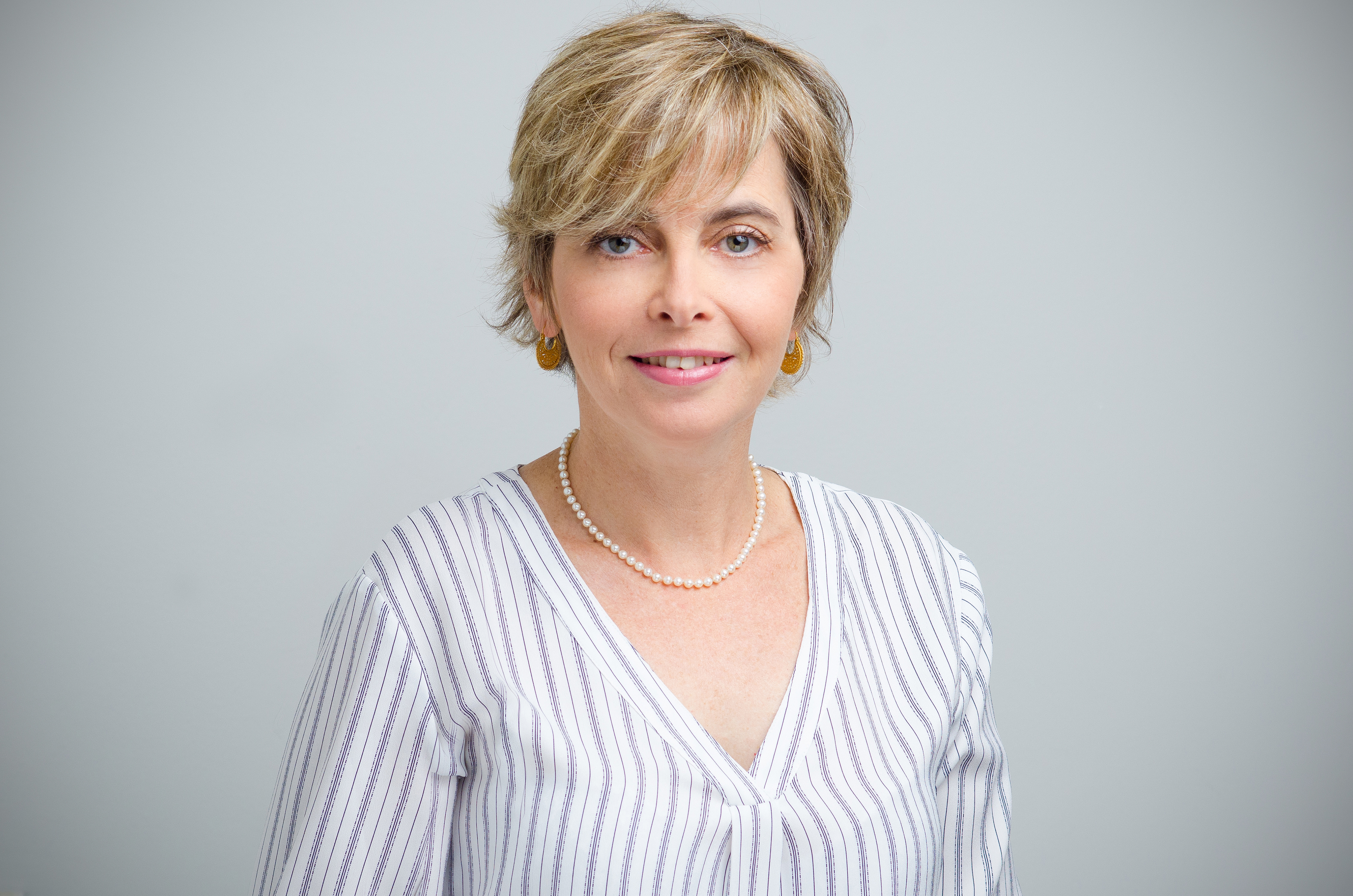 מיכל הלפרין